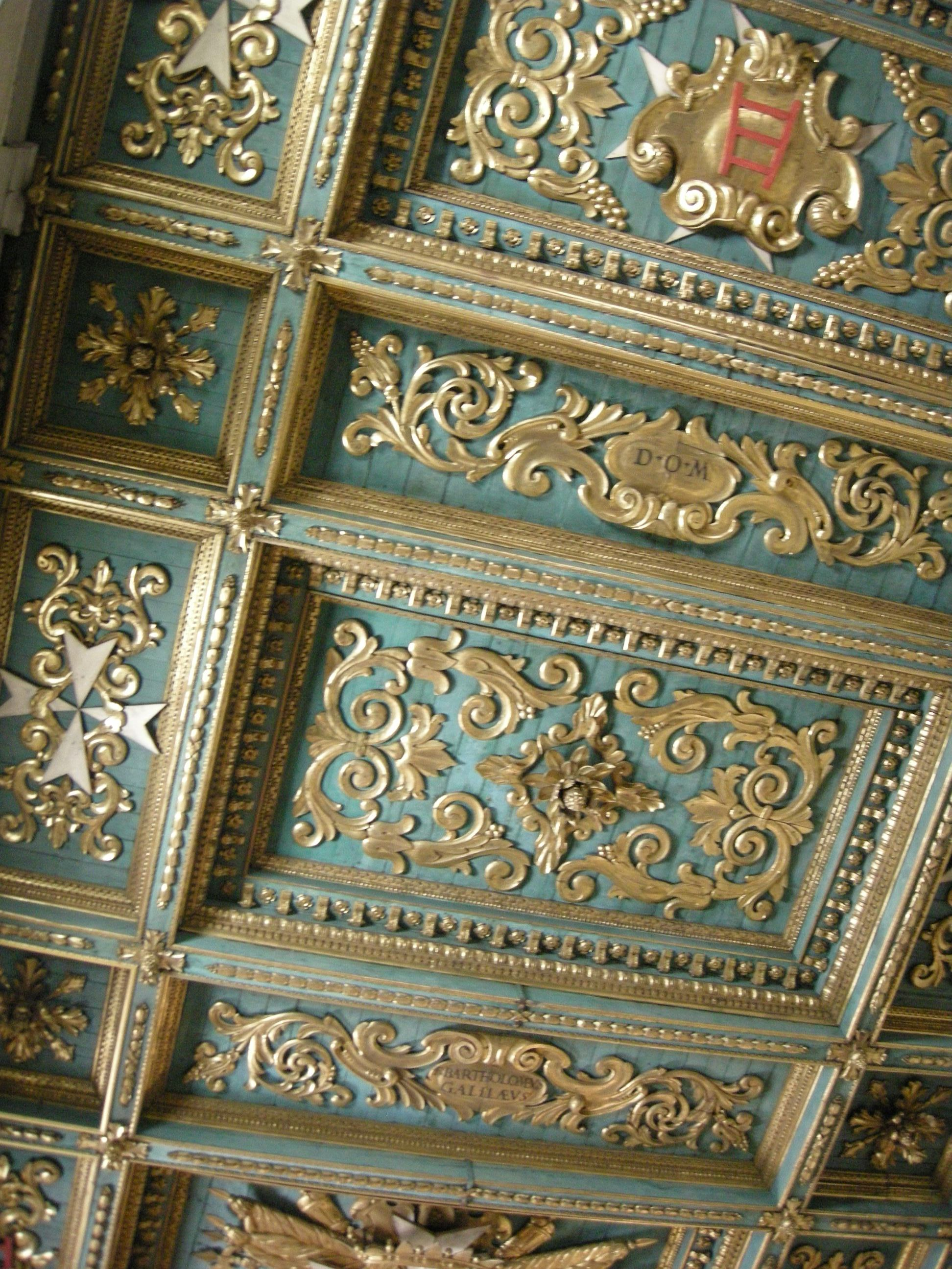 Chiesa dei santi simone e giuda, interno, soffitto